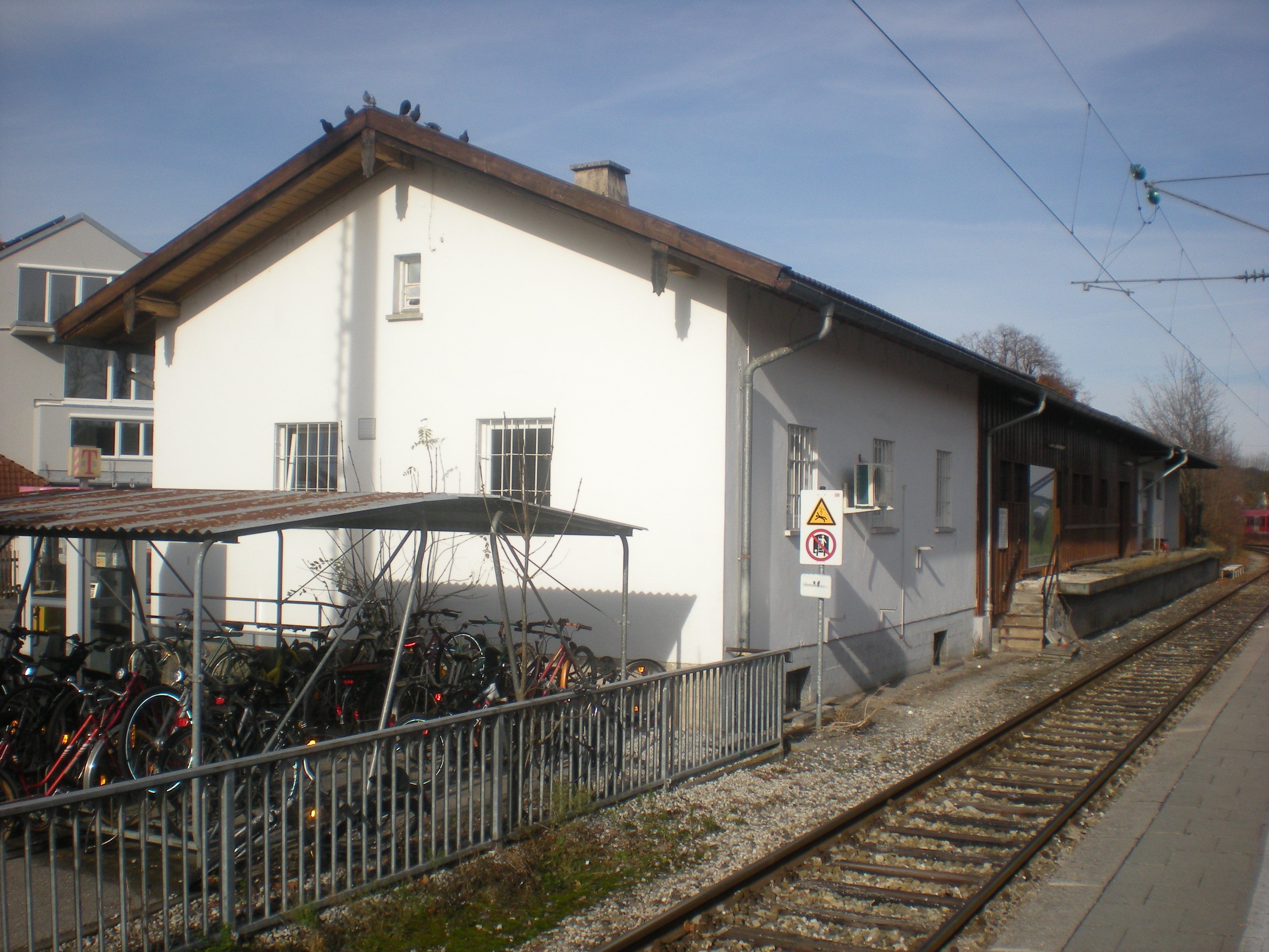 ehemaliger Güterschuppen des Bahnhofs Wolfratshausen